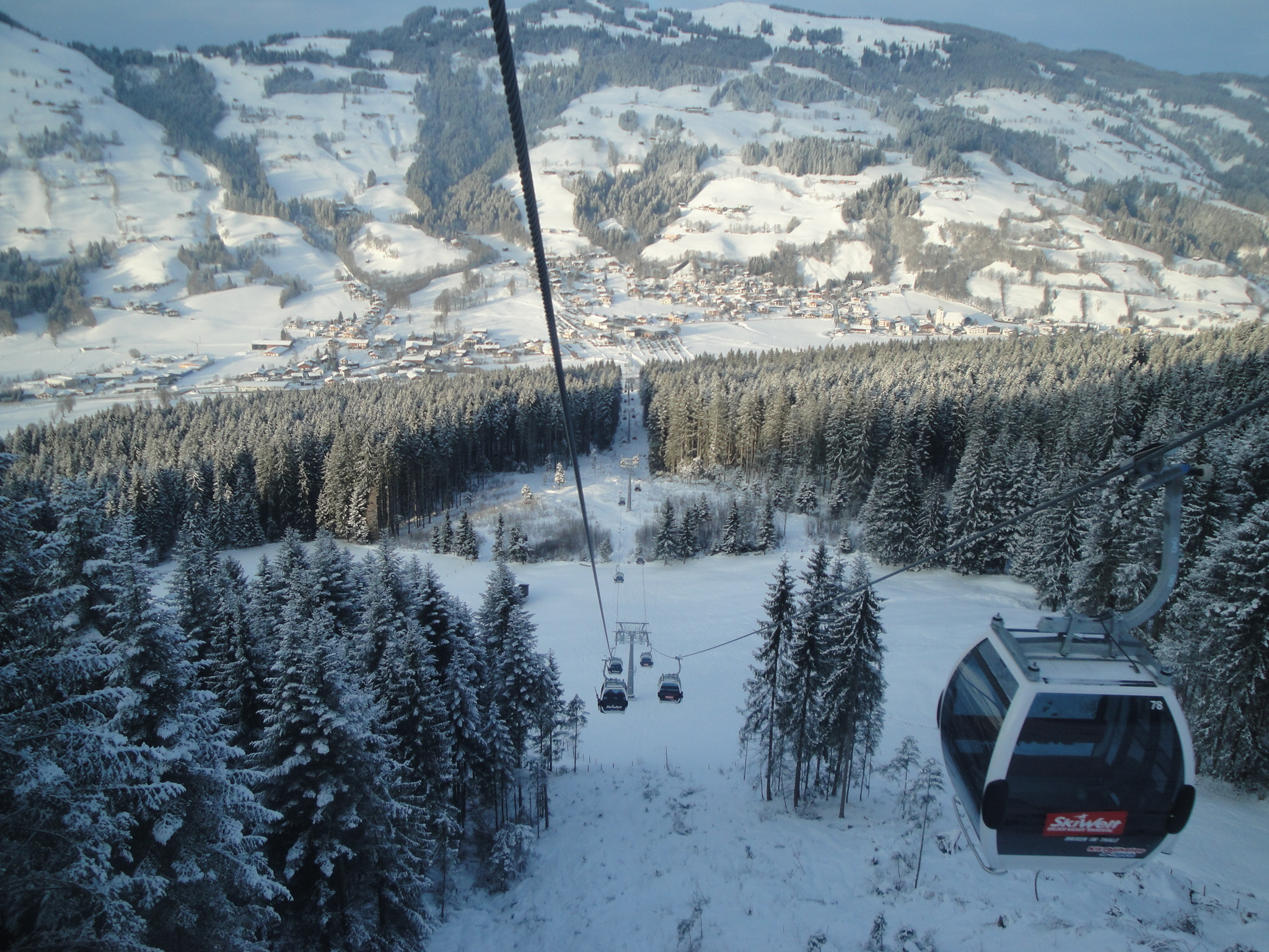 Uitzicht vanuit de Skiweltbahn op Brixental